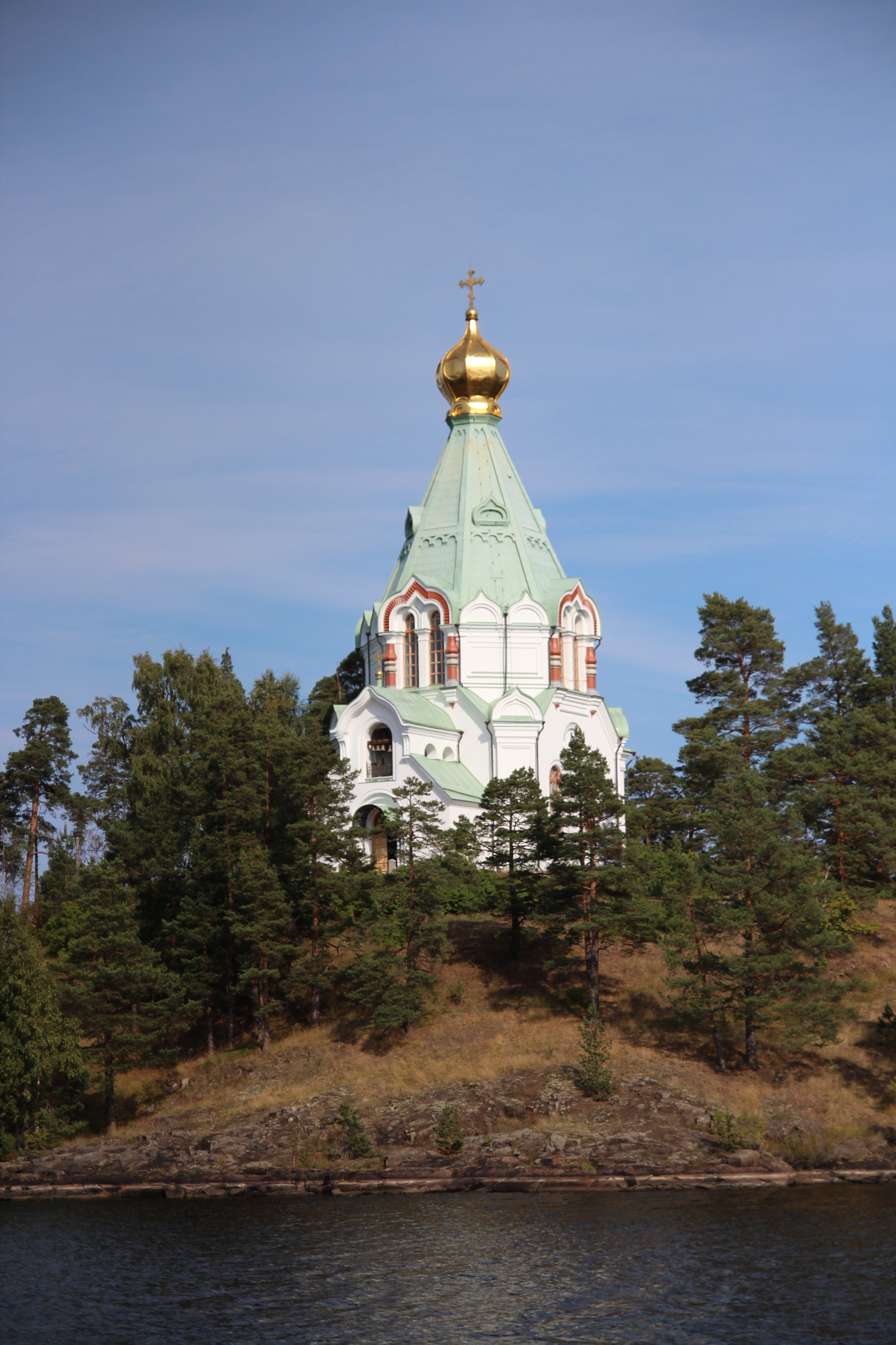 Никольский скит, Церковь Николая Чудотворца